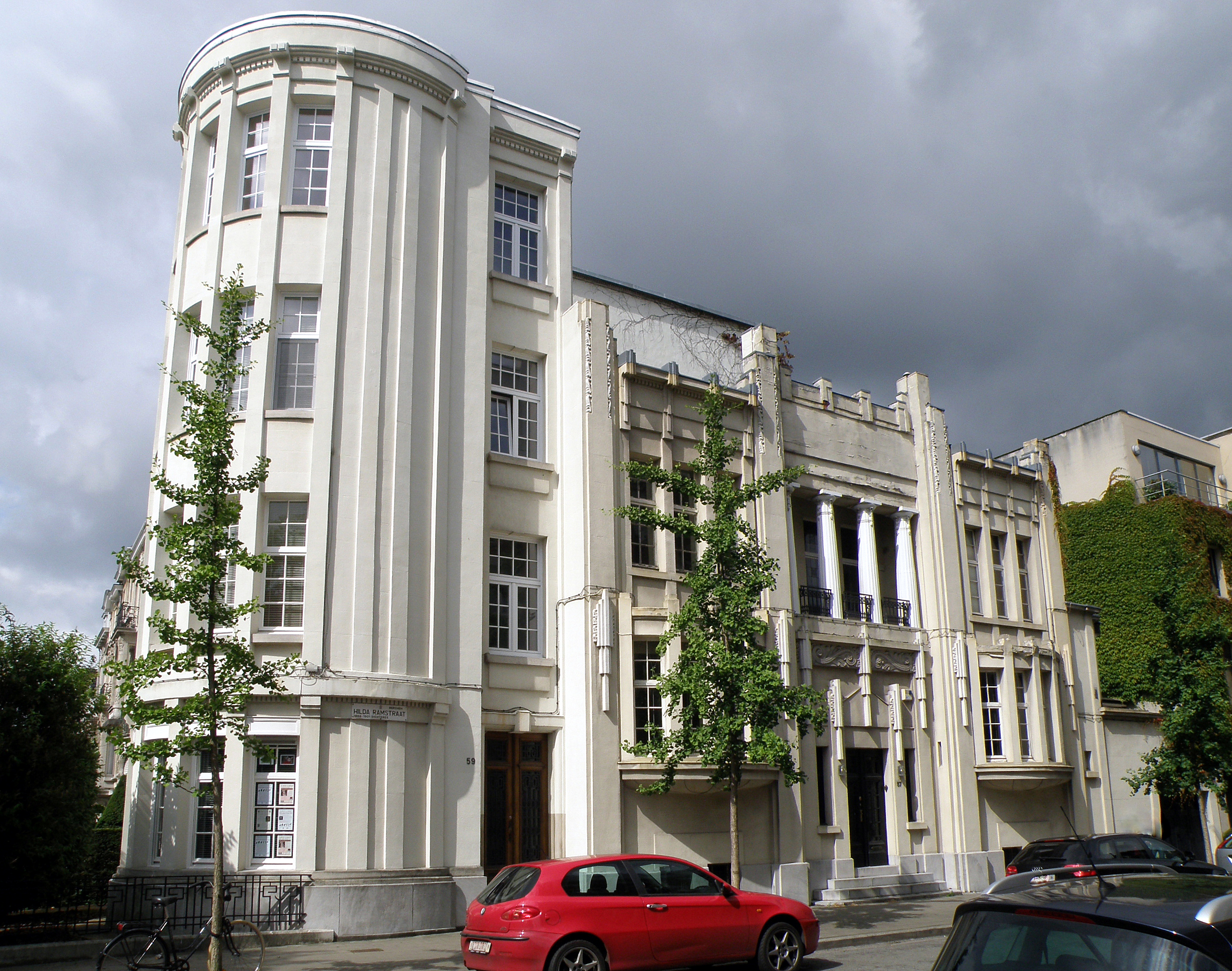 Antwerpen (België). Hoekgebouw Hilda Ramstraat/Koninklijkelaan, in wijk Middelheim. Bouwjaar 1923, ontwerp van archit. Louis Van Rijmenant.